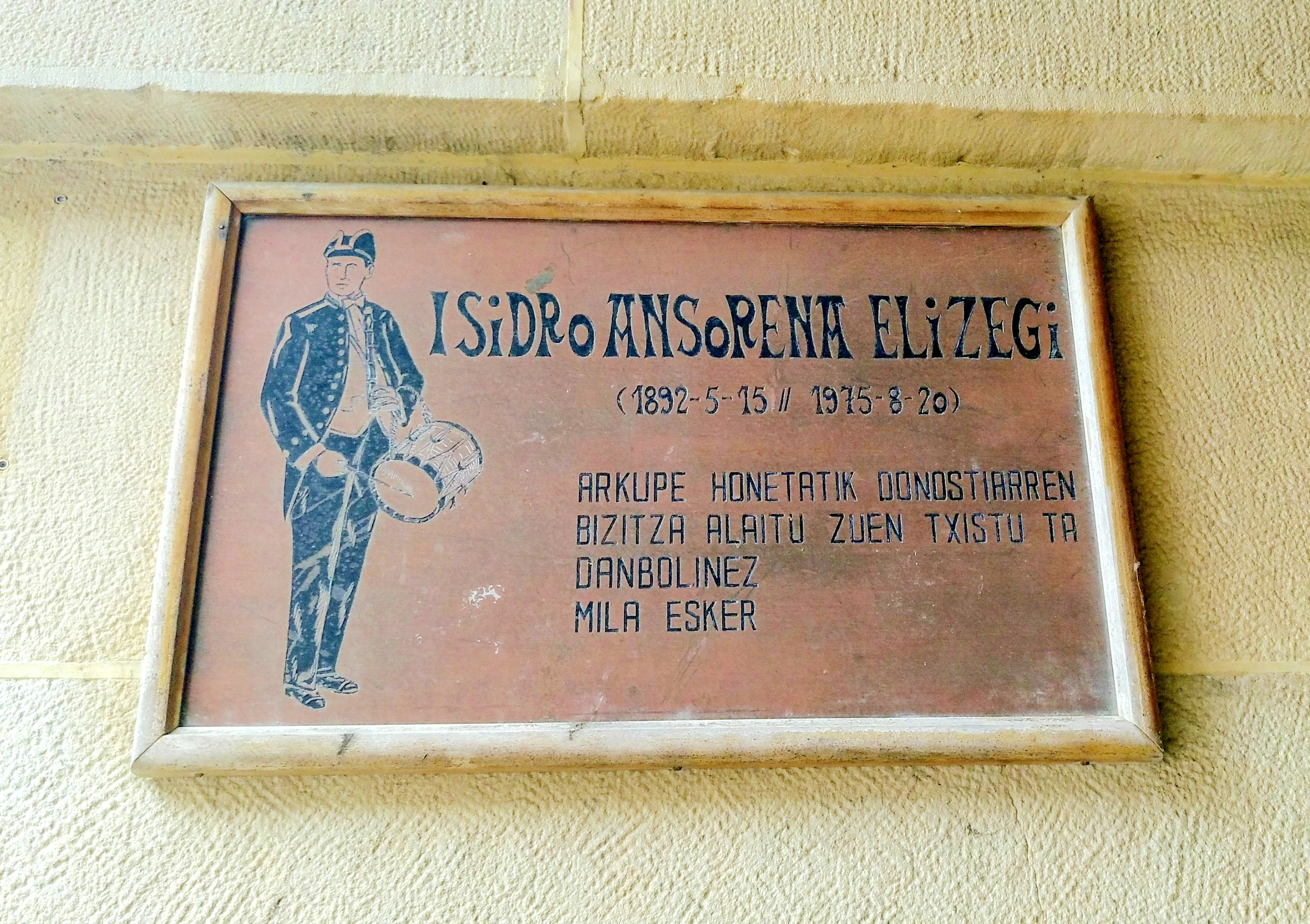 Isidro Ansorena txistulariaren oroigarria Donostiako Konstituzio enparantzan